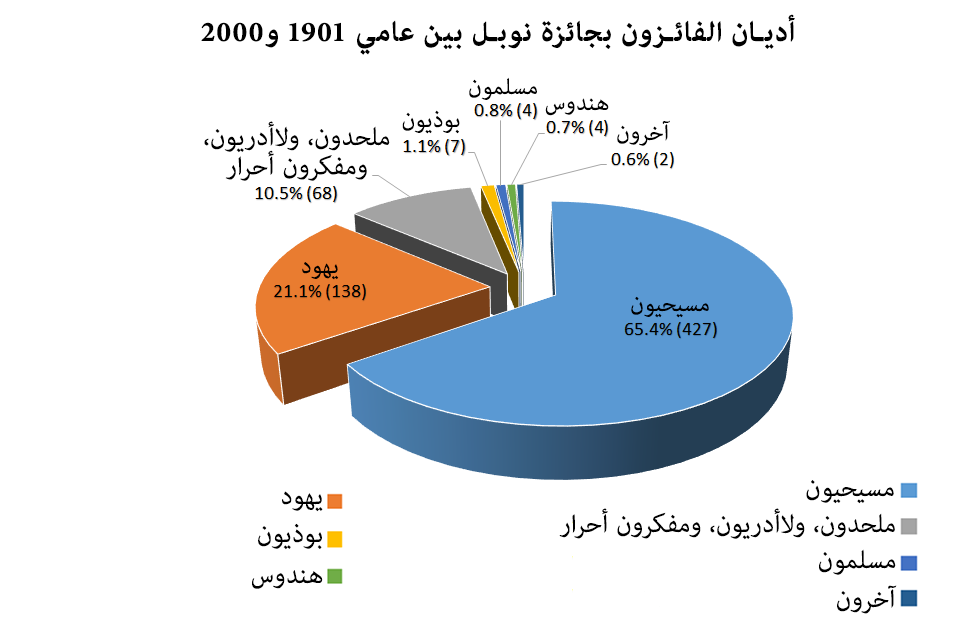 توزيع جوائز نوبل بحسب الدين المعطيات مأخوذة من كتاب 100 Years of Nobel Prizes باروخ شاليف، 100 عام على جوائز نوبل (2003)، مطبعة الناشرون والموزعون آتلانتك ص.57: بين الأعوام 1901 و2000 تبيّن أن 654 حاصل على جائزة نوبل إنتمى الى 28 ديانة، وينتمي حوالي (65.4%) من الحاصلين على جائزة نوبل إلى الديانة المسيحية بطوائفها المتعددة. حصل المسيحيون بين السنوات 1901-2000 على 78.3% من جوائز نوبل للسلام، وعلى 72.5% من جوائز نوبل في الكيمياء، وكان 65.3% من جوائز نوبل في الفيزياء، و62% من جوائز نوبل في الطب، و53.5% من جوائز نوبل في الإقتصاد و49.5% من جوائز نوبل في الأدب من نصيب المسيحيين. يُذكر أن البروتستانت والمسيحيين الذين لم تحدد طائفتهم يتركز حضورهم في تصنيفات جوائز نوبل في الكيمياء والفيزياء والطب في حين أن الكاثوليك يتركز تمثليهم في جوائز نوبل للأدب والسلام والطب، أمّا الأرثوذكس الشرقيين لديهم تمثيل عالي في تصنيفات نوبل للفيزياء والإقتصاد والأدب حوالي 10.5% من الحاصلين على جائزة نوبل كانوا من الملحدين واللا أدريين (بين الأعوام 1901-2000) في حين ترتفع النسبة إلى 35% من الحاصلين على جائزة نوبل في الأدب هم من اللادينيين والملحدين، في حين حصل اليهود على أكثر من 20% من جوائز نوبل (بين الأعوام 1901-2000). وحصل إحدى عشرة مسلمين على جائزة نوبل (بين الأعوام 1901-2014) حصل سبعة منهم على جائزة نوبل للسلام.